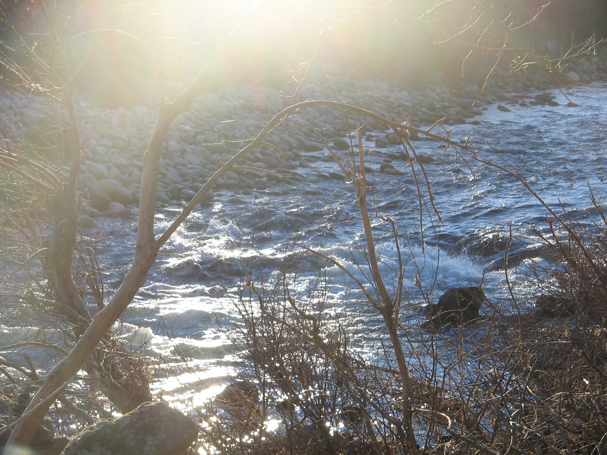 Río Tormes a su paso por Navamorisca (El Losar) en la margen izquierda y Vallehondo (San Lorenzo de Tormes) margen derecha, en la provincia de Ávila (España).